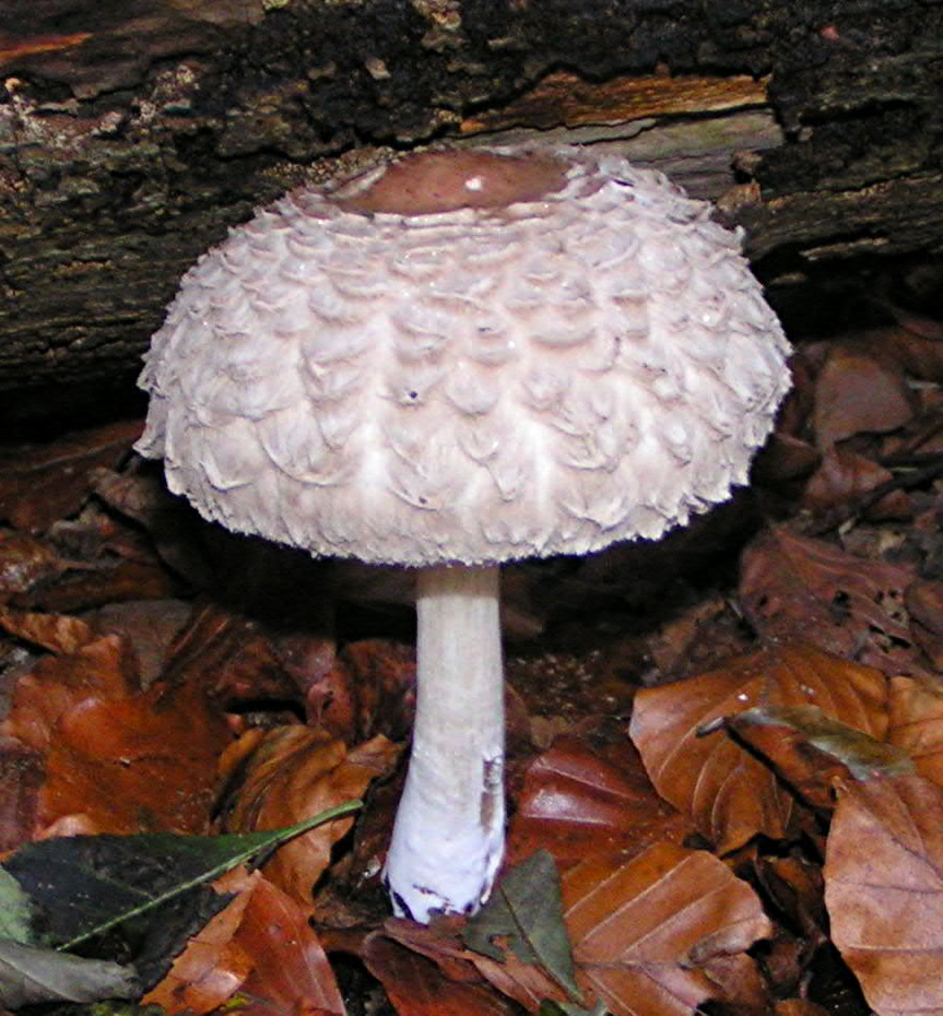 Knolparasolzwam november 2004